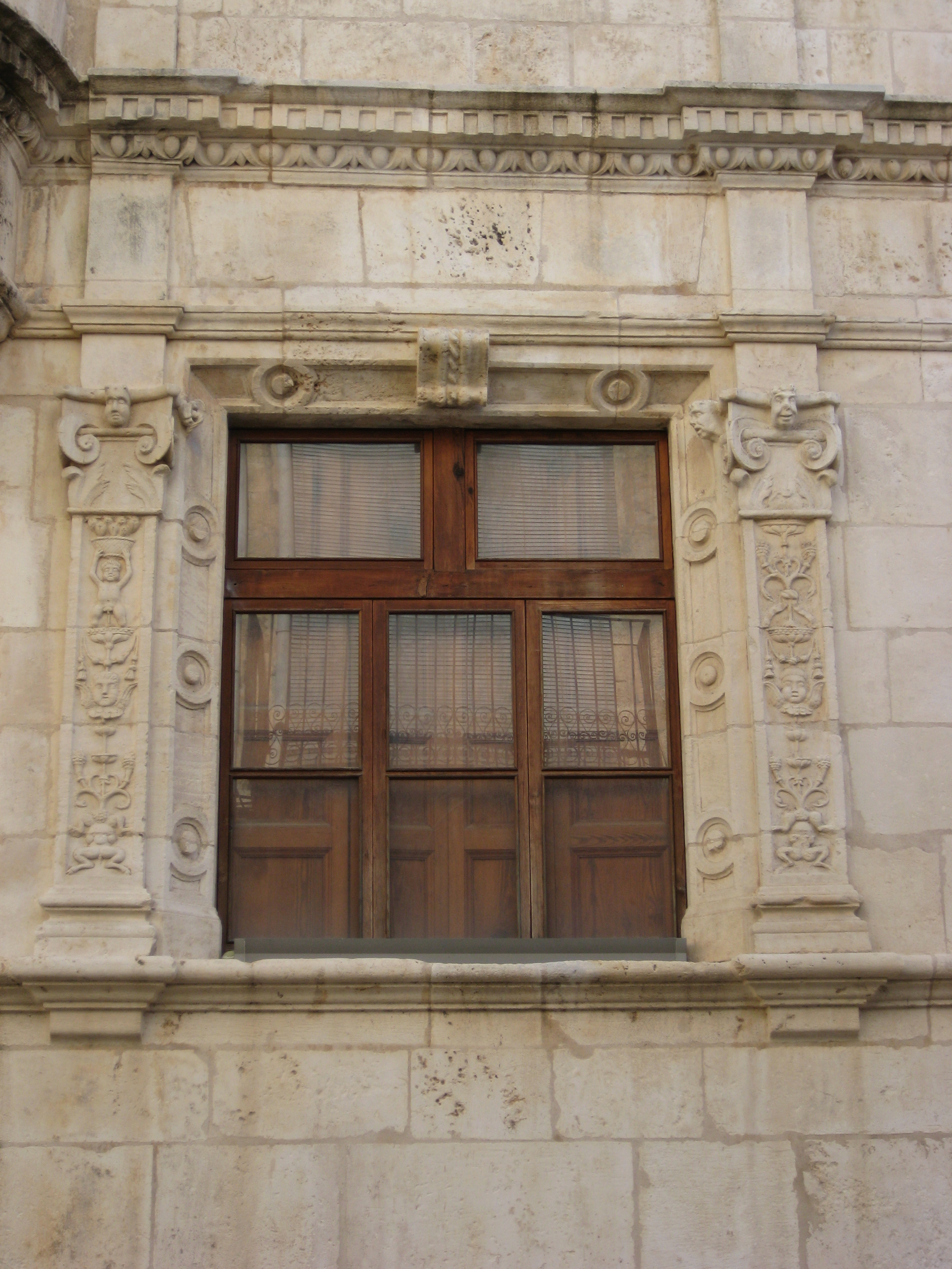 Finestra esquerra de l'entresòl del Palau del Marqués de Villores de Sant Mateu (Baix Maestrat)